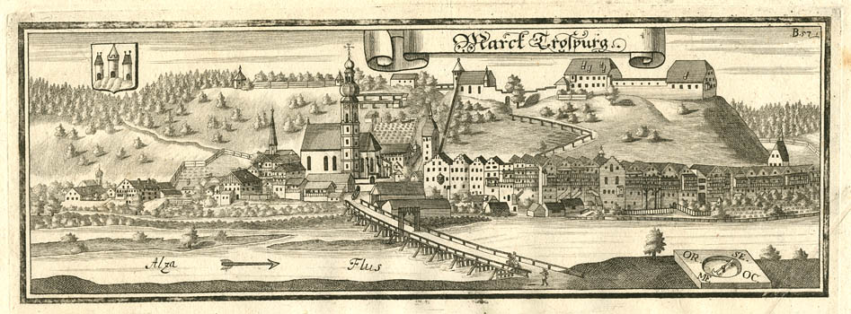 “Marck Trospurg” (Trostberg), aus : Beschreibung des Churfürsten- u. Hertzogthumbs Ober- und Nidern Bayrn. – Rentamt Burghausen, 2. Auflage um 1750